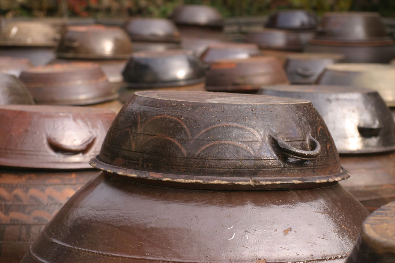 Kimchi pots Kimchi jars